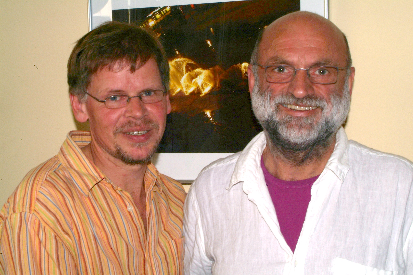 Der schwule Pastor Hans-Jürgen Meyer (rechts) mit seinem Lebensgefährten Bernd Iwan im Andersraum anläßlich der Lesung aus seinem Buch "Lieben - Leiden -Lachen. Ein schwuler Pfarrer erzählt".